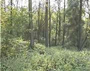 eigen werk, waarvan het gebruiksrecht is afgestaan aan Natuurpunt Waasland Noord.